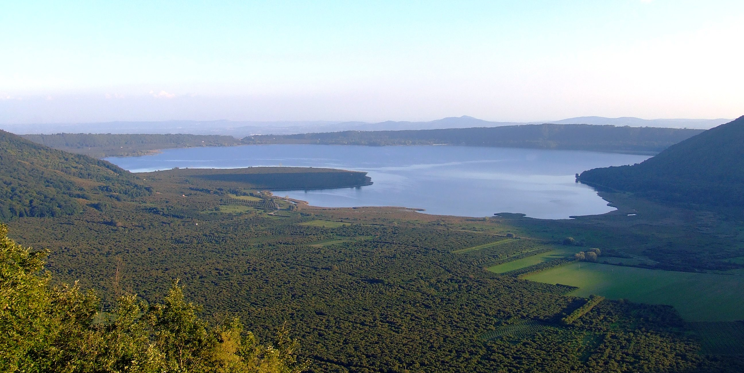 Un panorama del Lago di Vico dala piattaforma di lancio deltaplani